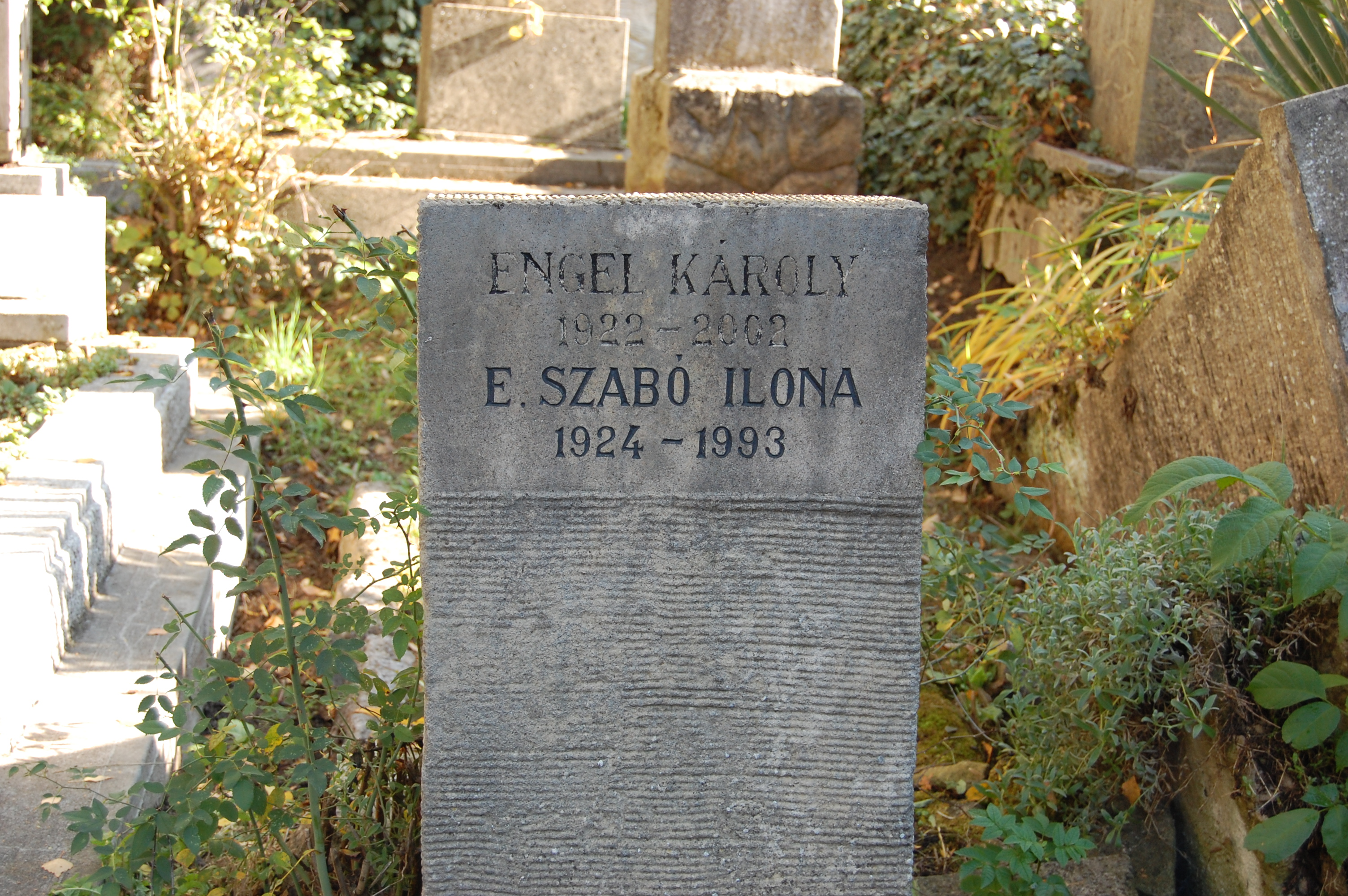 Engel Károly bibliográfus és felesége sírja, Kolozsvár, Házsongárdi temető, lutheránus temetőrész eleje